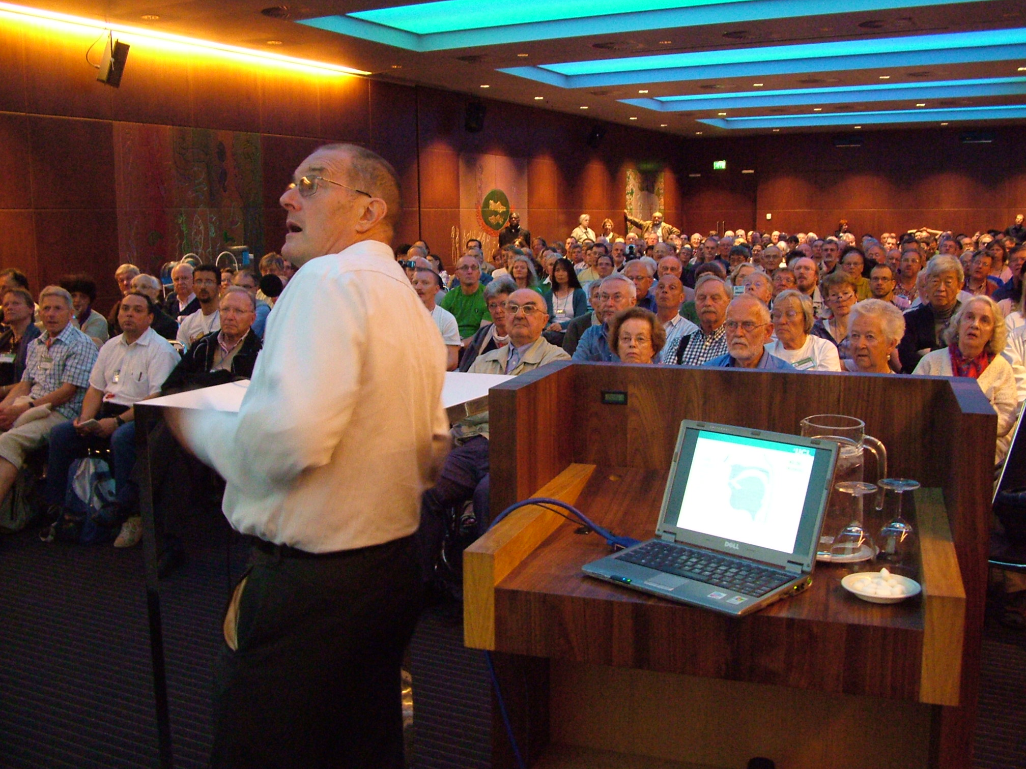 Universala Kongreso de Esperanto, Roterdamo 2008. John Wells, IKU-prelego: "La mirinda mondo de la parolsonoj".